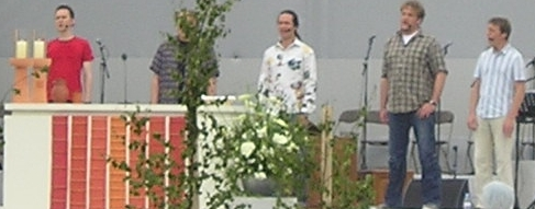 Die Wise Guys beim Abschlussgottesdienst des Deutschen Evangelischen Kirchentages 2007 am 10.06.2007.